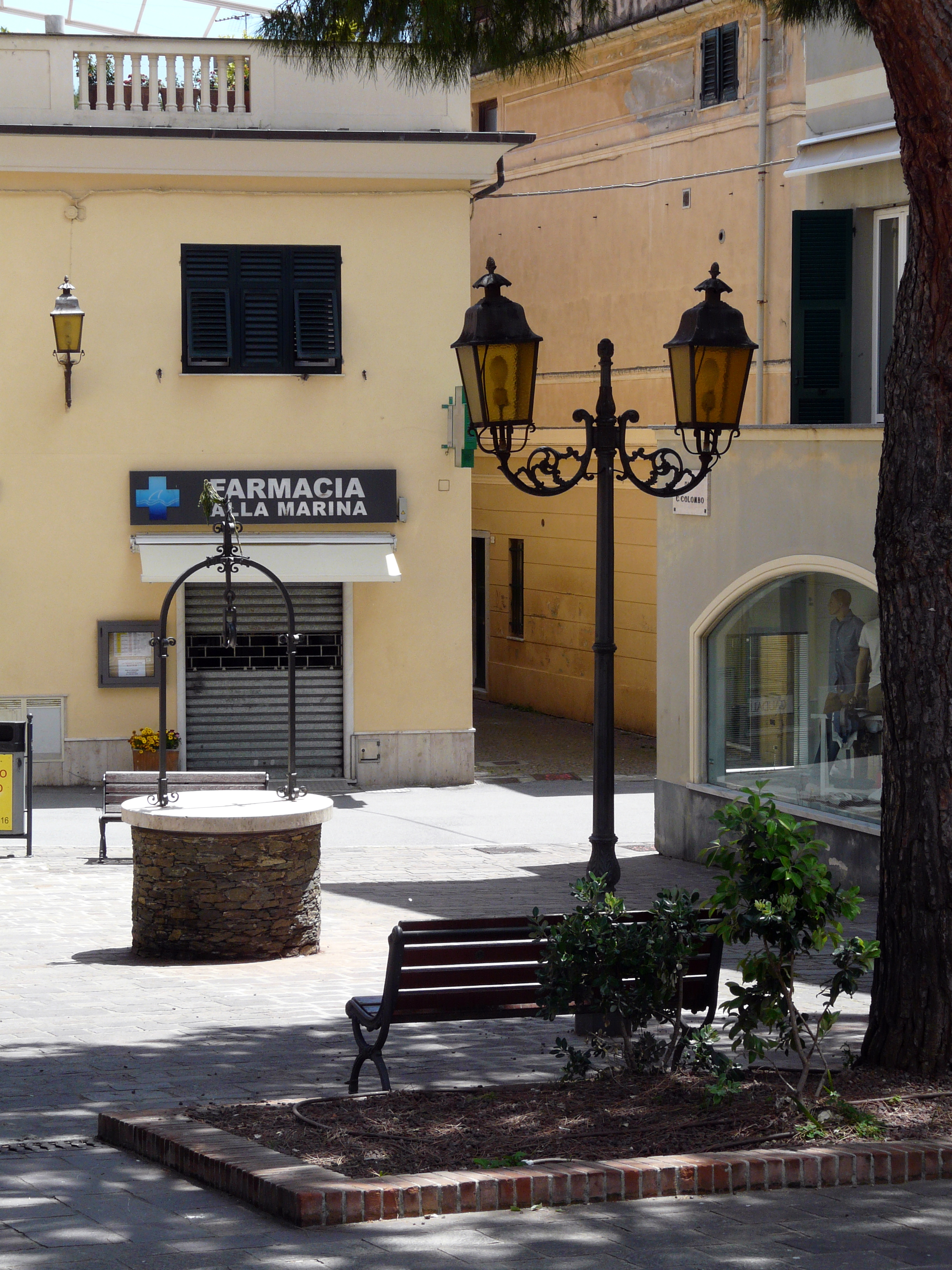 Centro storico di Arenzano, Liguria, Italia